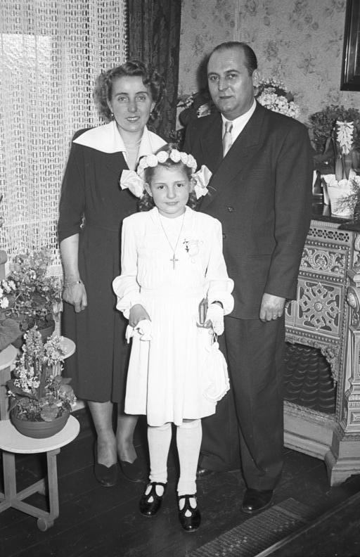 Kommunion 1950-1953